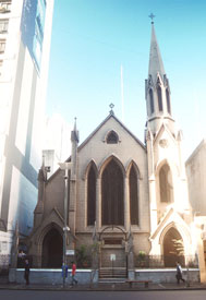 Nuevo templo de la Primera Iglesia Metodista de Buenos Aires, inaugurado en 1874, pertenece en 2007 a la Iglesia Evangélica Metodista Argentina.